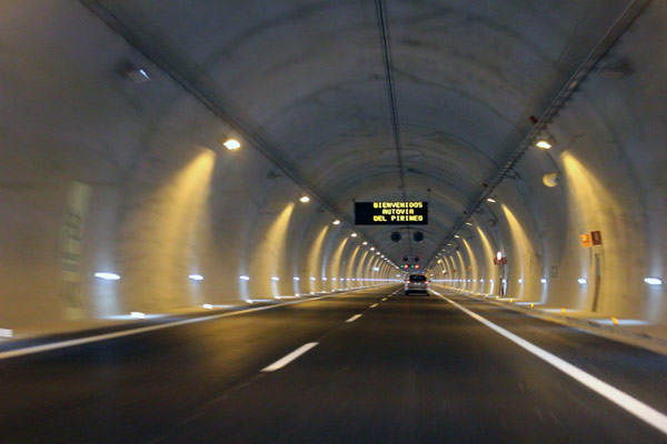 Tunel de Yesa en la A-21